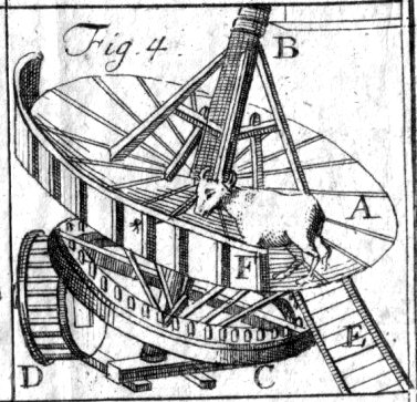 Göpelmühle, Zeichnung eines Ochsengöpels (Laufbrett-Mühle) nach Adam Meltzer - 1805.Grafik - Tafel Nr. V Fig. 4